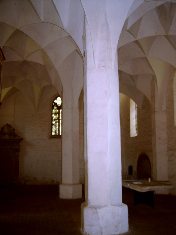 Der Innenraum der St. Petrikapelle gen Osten